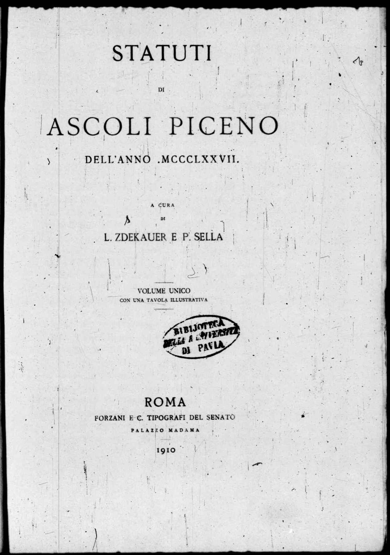 Frontespizio